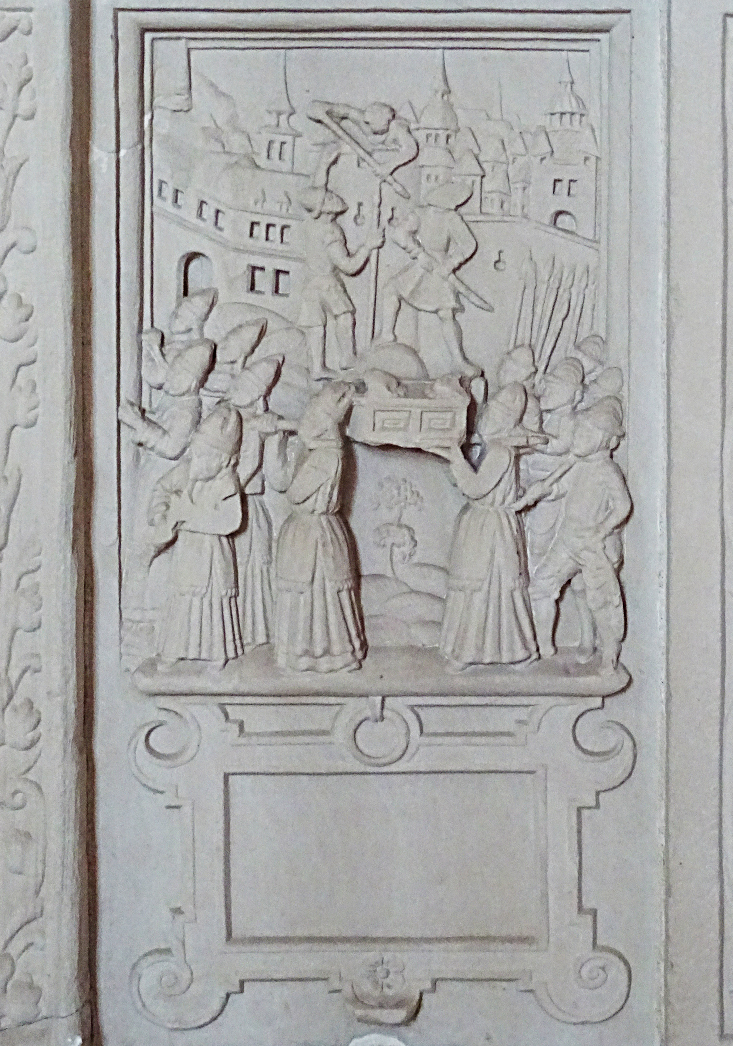 Steinbilderbibel in der St. Annenkirche (Eisleben), 20/29, Eroberung von Jericho